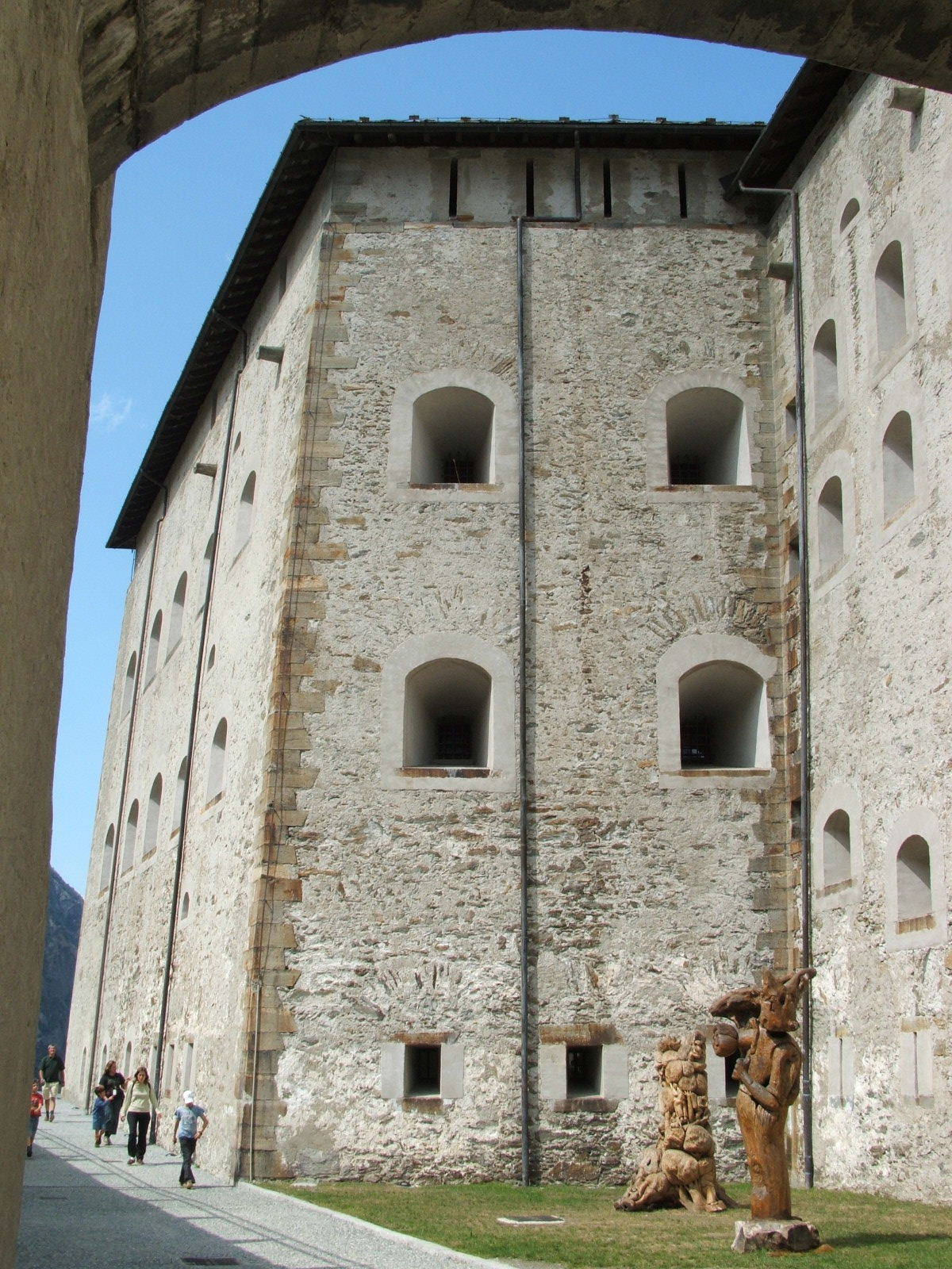 Valle d'Aosta - Forte di Bard e Museo delle Alpi di Bard